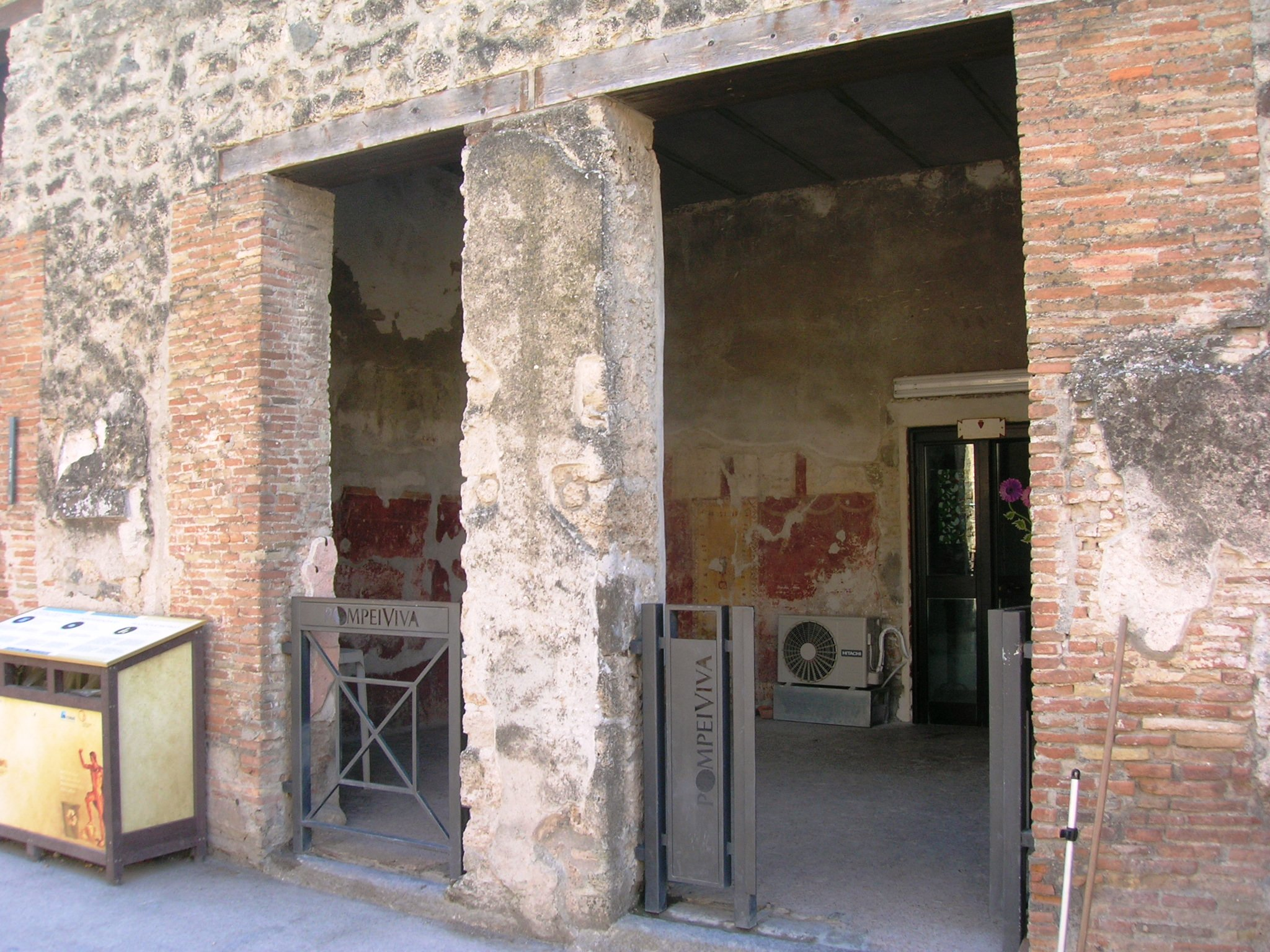 Taberna